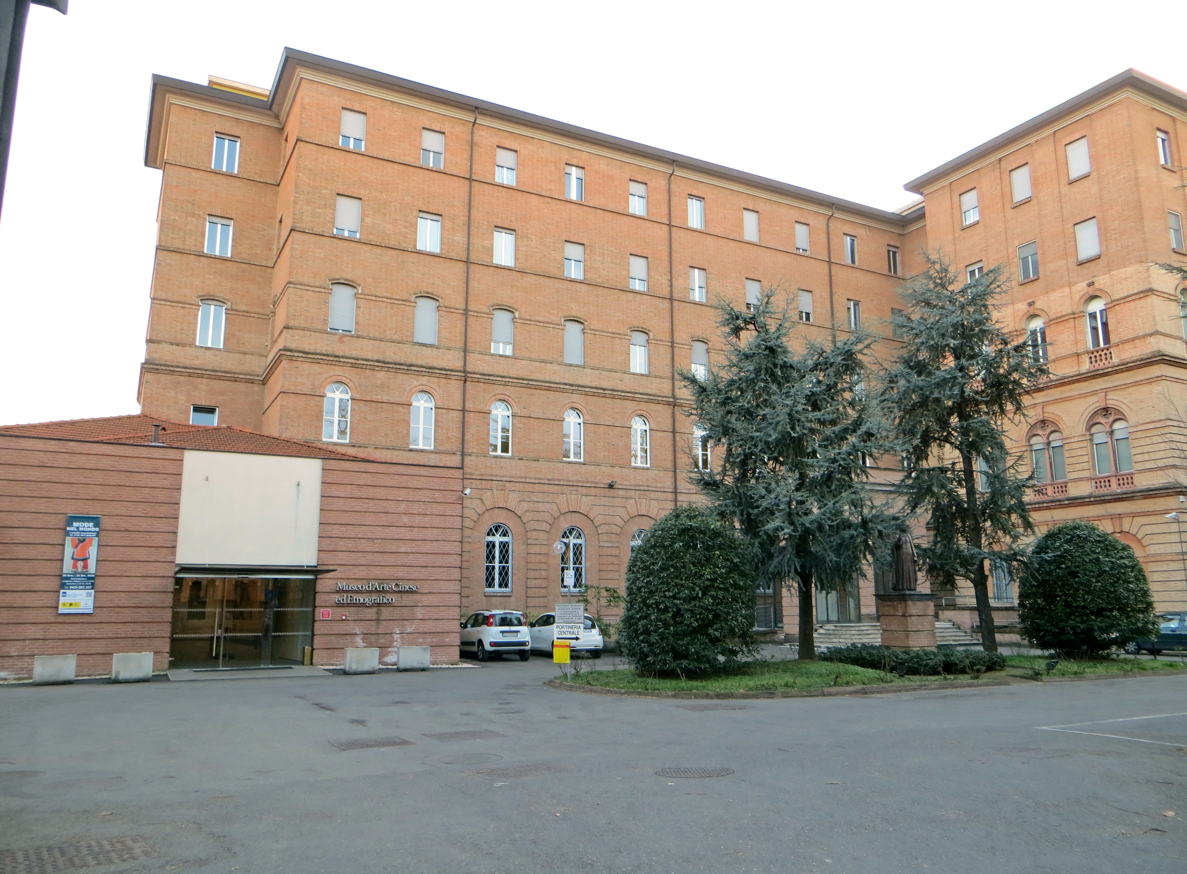 Casa madre dei Missionari Saveriani (Parma) - ala est e ingresso al Museo d'arte cinese ed etnografico